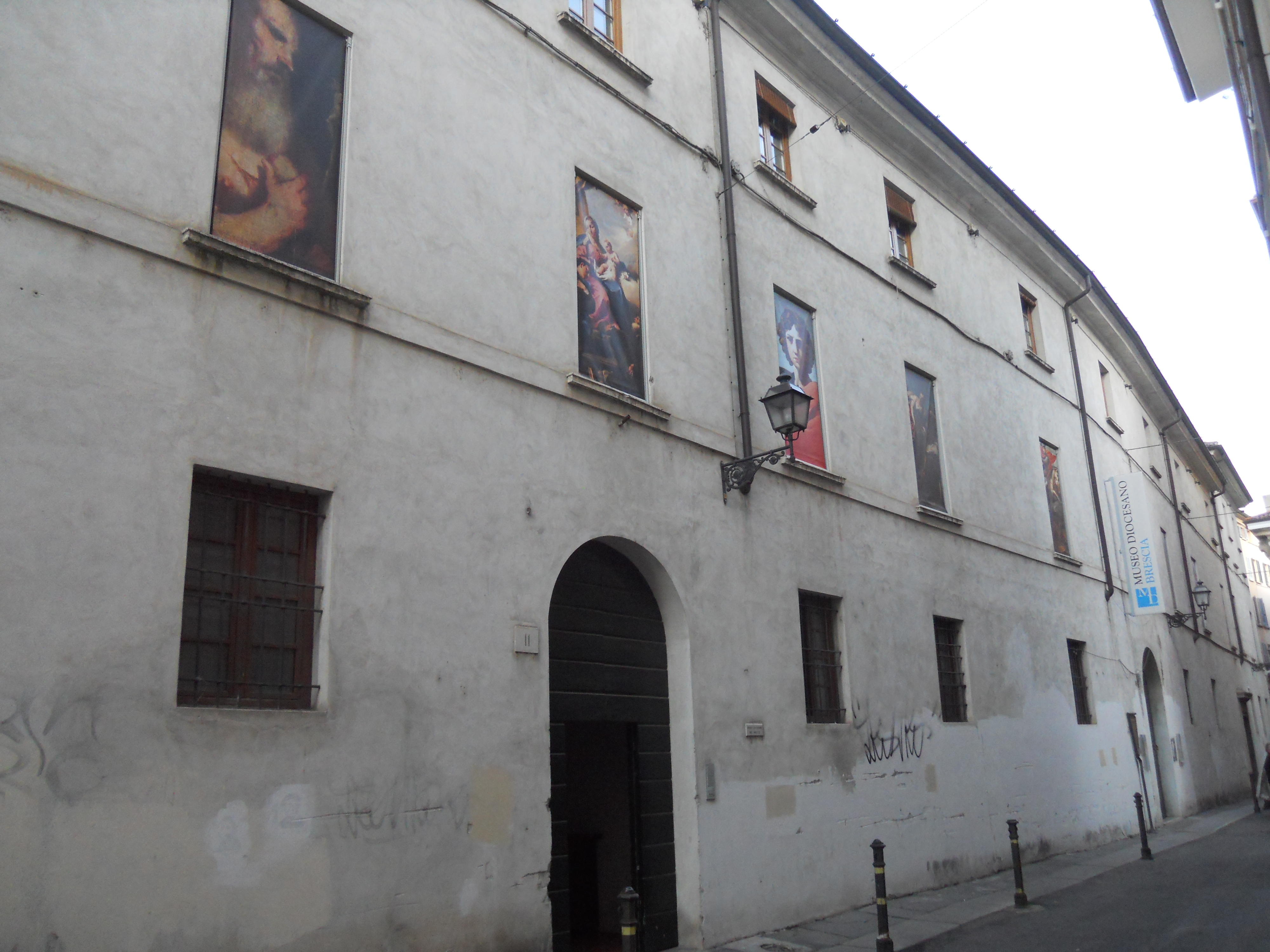 Museo diocesano di Brescia (esterno)